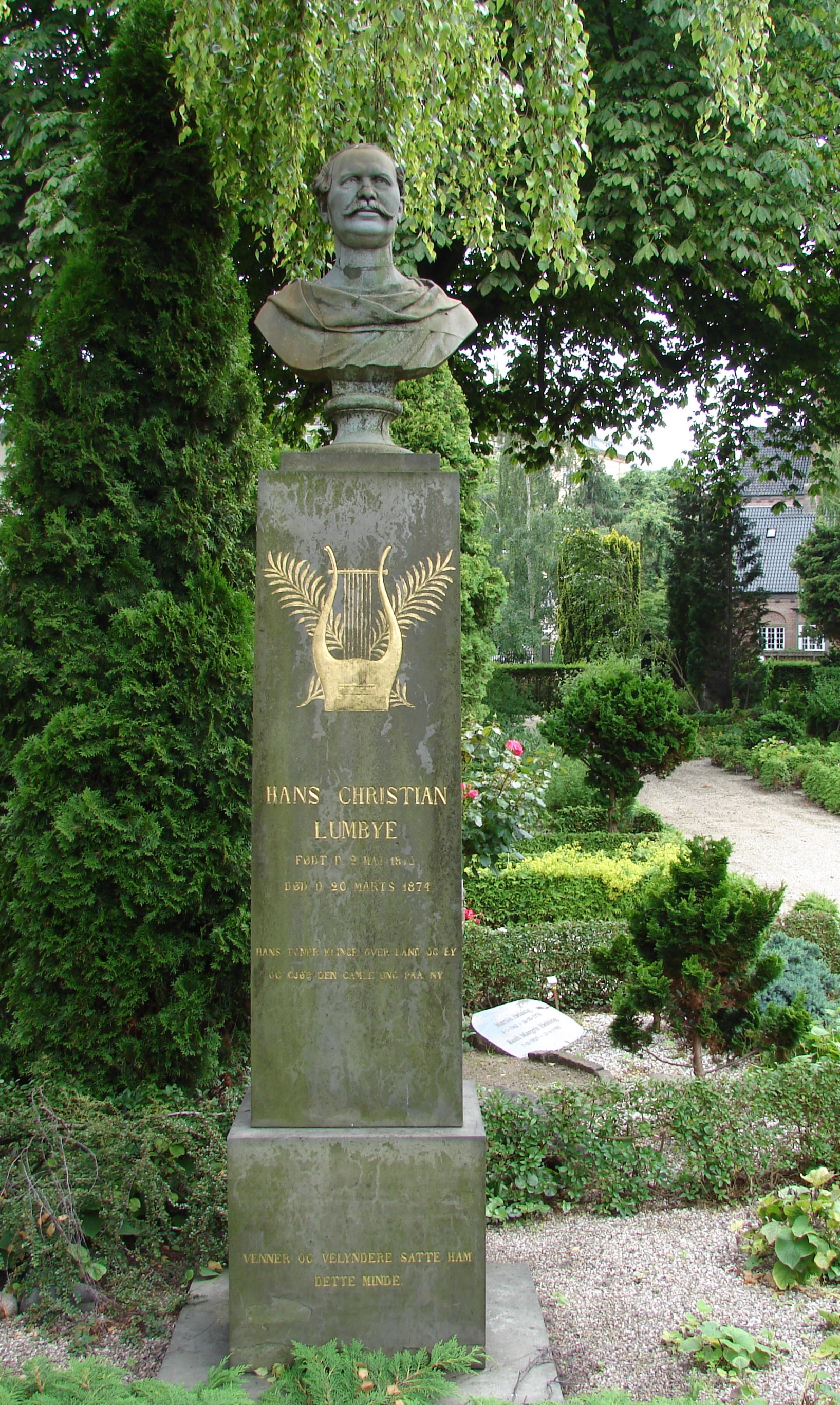 Hans Christian Lumbye (1810-1874), komponist, Holmens Kirkegård, København